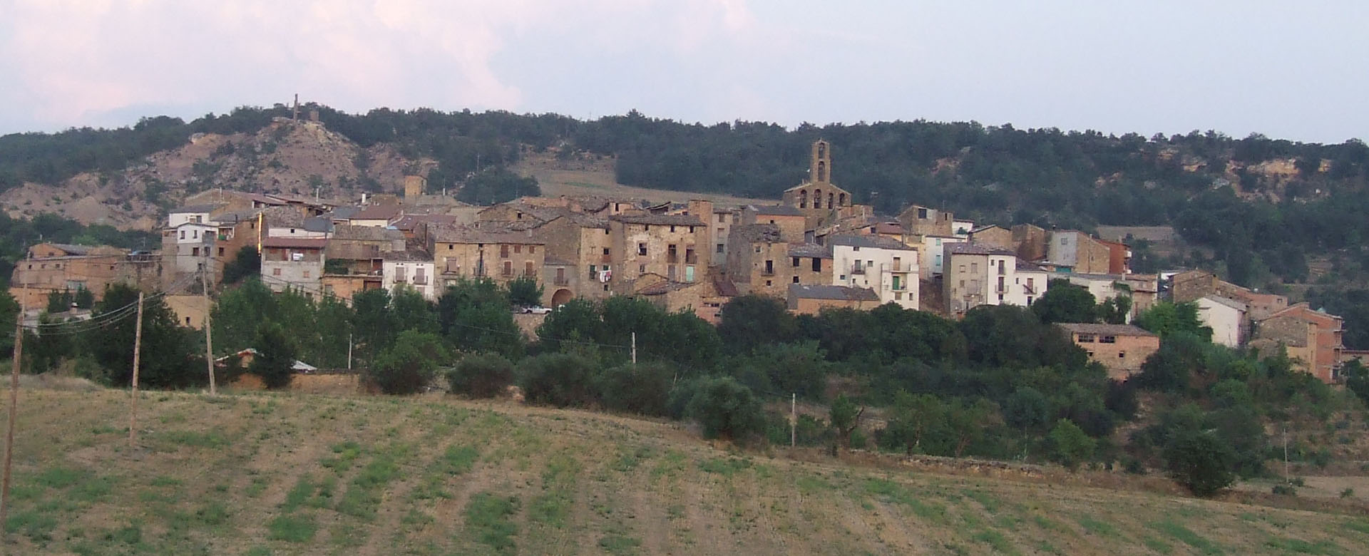 Vista general des de ponent de Figuerola d'Orcau (Isona i Conca Dellà, Pallars Jussà)